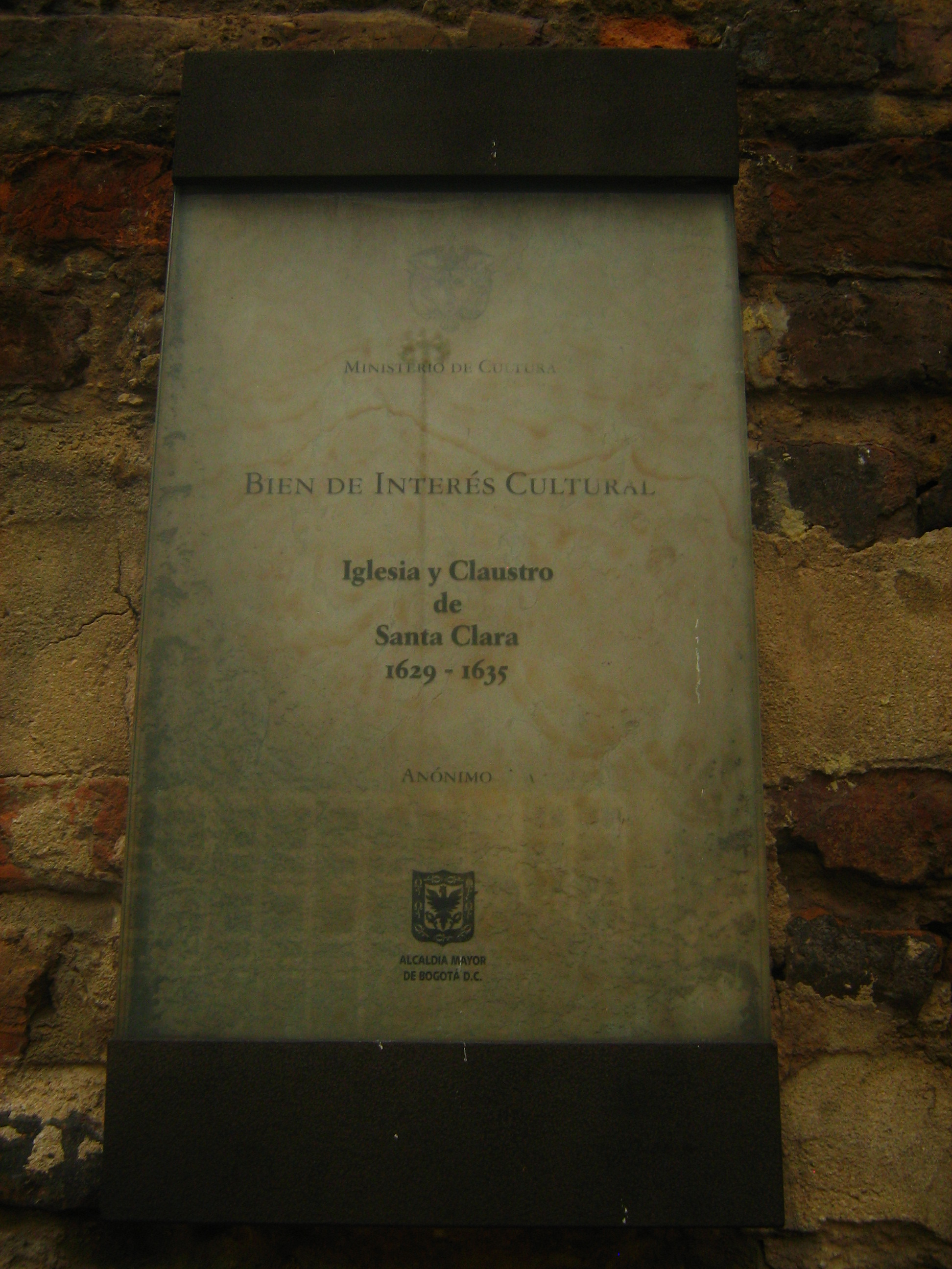 Es es un forma de presentar la iglesia de Santa Clara mostrando el letrero como veracidad de las fechas en las que esta se construyó.